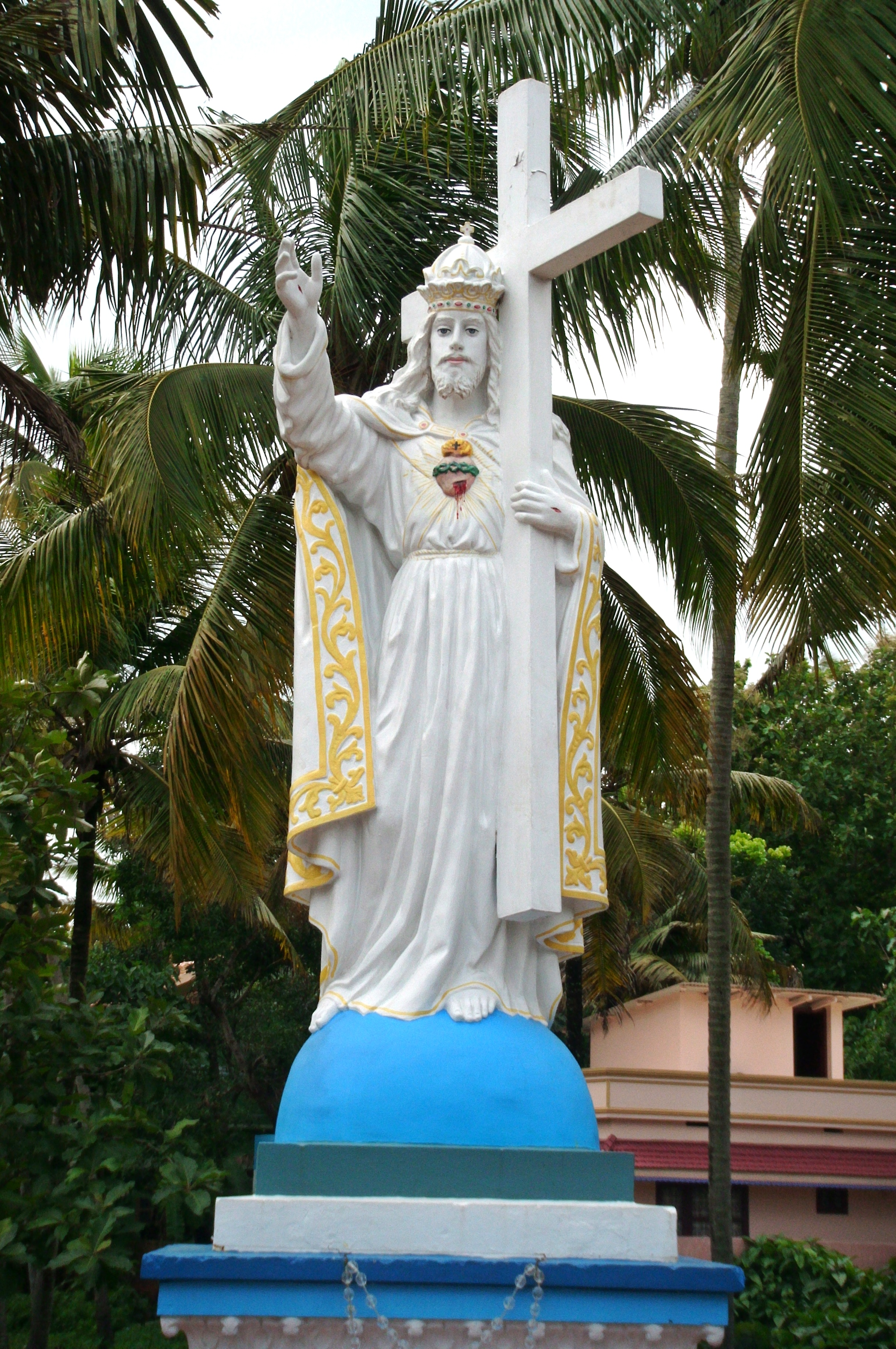 Christkönigsdenkmal, 1944, Kanjiracode, Kollam District, Kerala, Indien